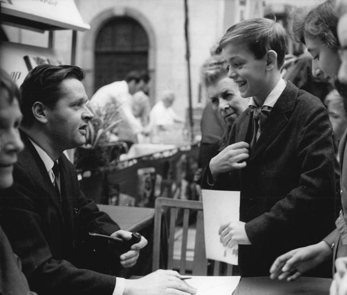 Zentralbild Raphael 14.10.1967 Fest der Freundschaft Leipzig: Bei Schriftstellern zu Gast Auf einem Buchbasar am 14. Okt. 1967 auf dem Leipziger Naschmarkt gab Werner Schmoll, Autor vieler bekannter Kinderbücher, seinen jungen Lesern Autogramme und informierte sich über ihre speziellen Wünsche.